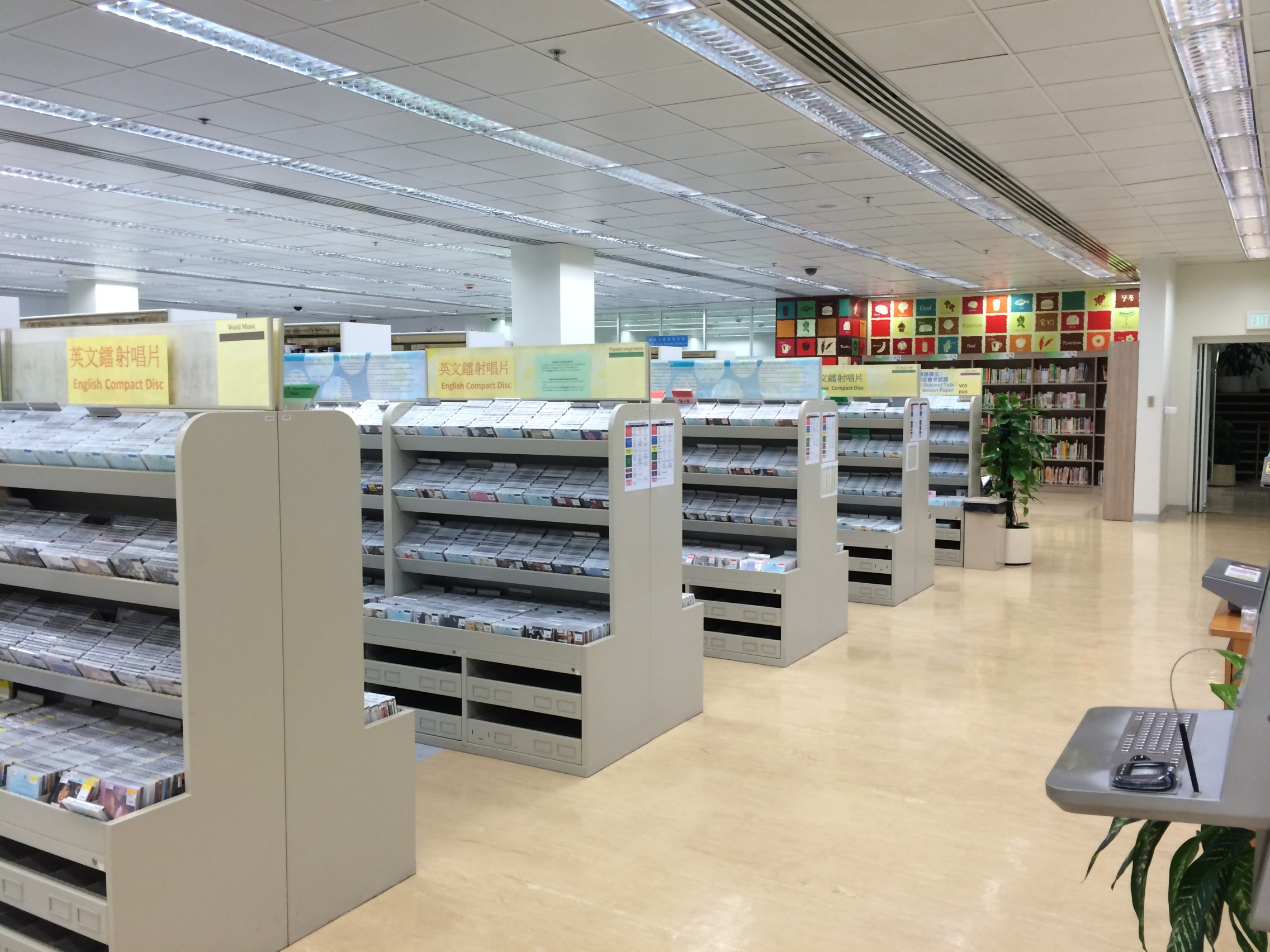 Tuen Mun Public Library Level 2 Disc Rental